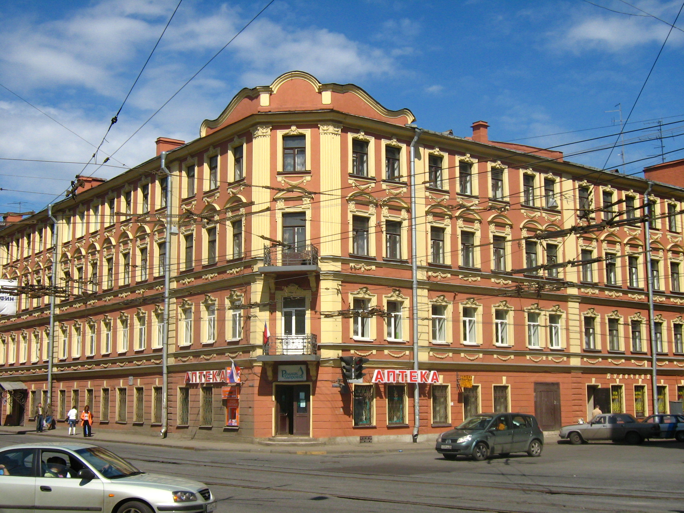 Lesnoy avenue - Komissara Smirnova Street (St.-Petersburg, Russia)